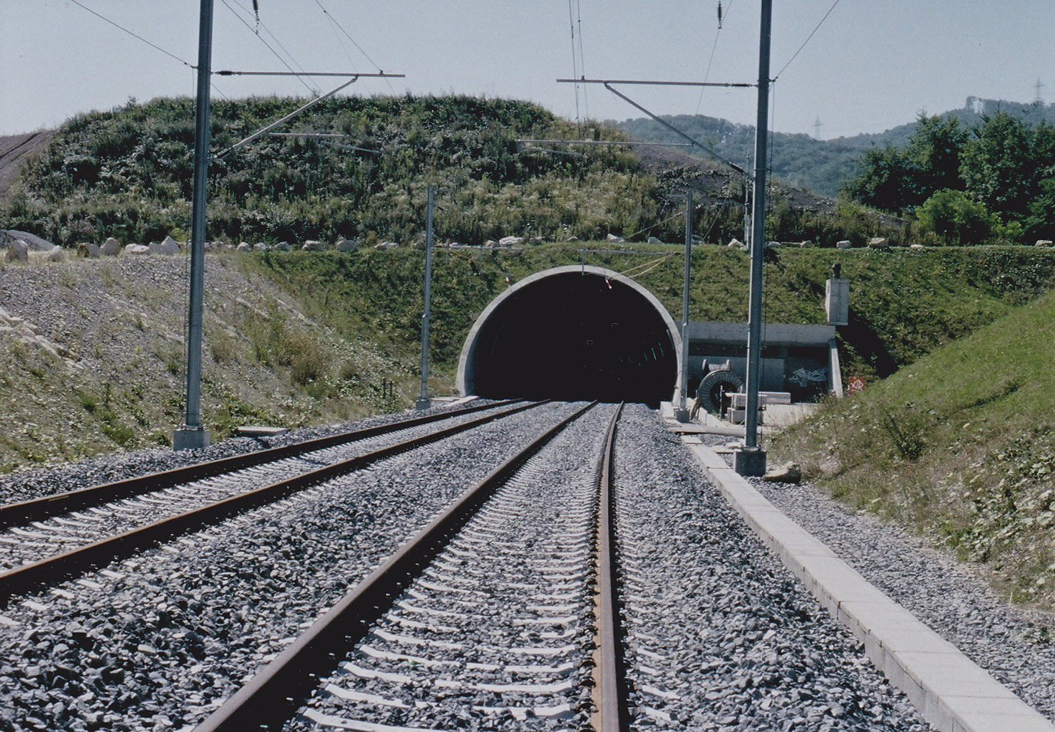 Adlertunnel Seite Pratteln